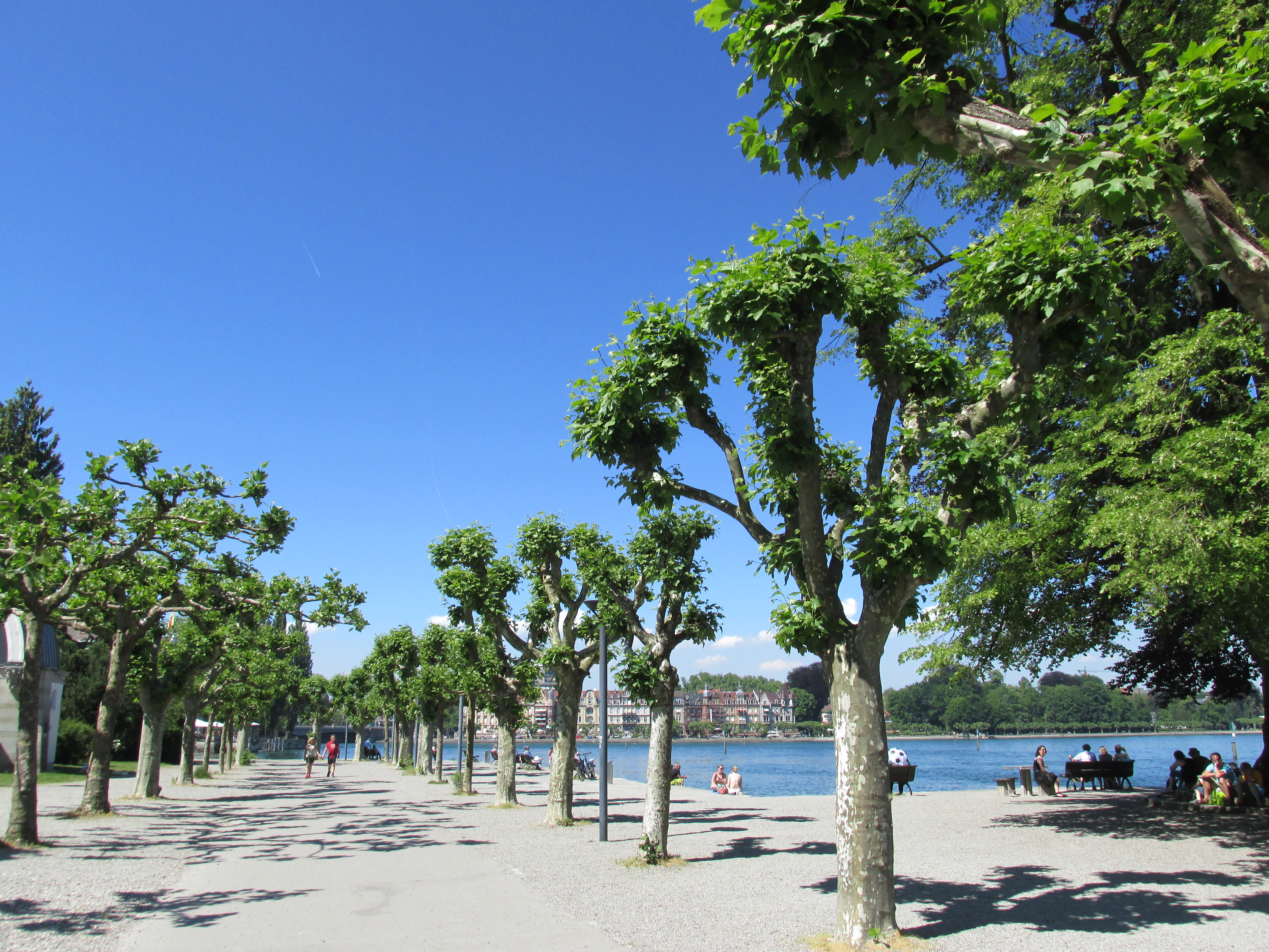 Uferpromenade am Stadtgarten Konstanz